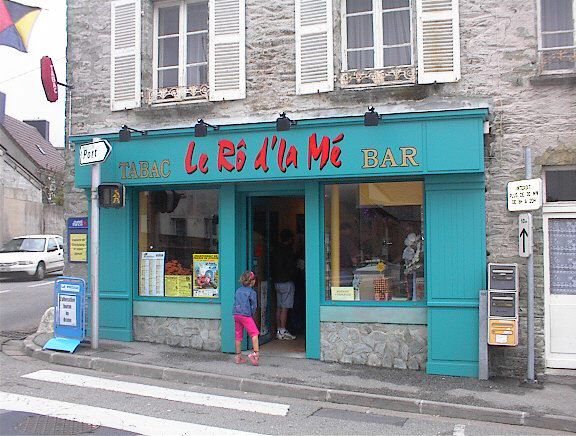 Eune aubèrge dans la vaîthinné d'Chèrbourg dé tchi l'nom est en Nouormand (Le Becquet, Tourlaville)